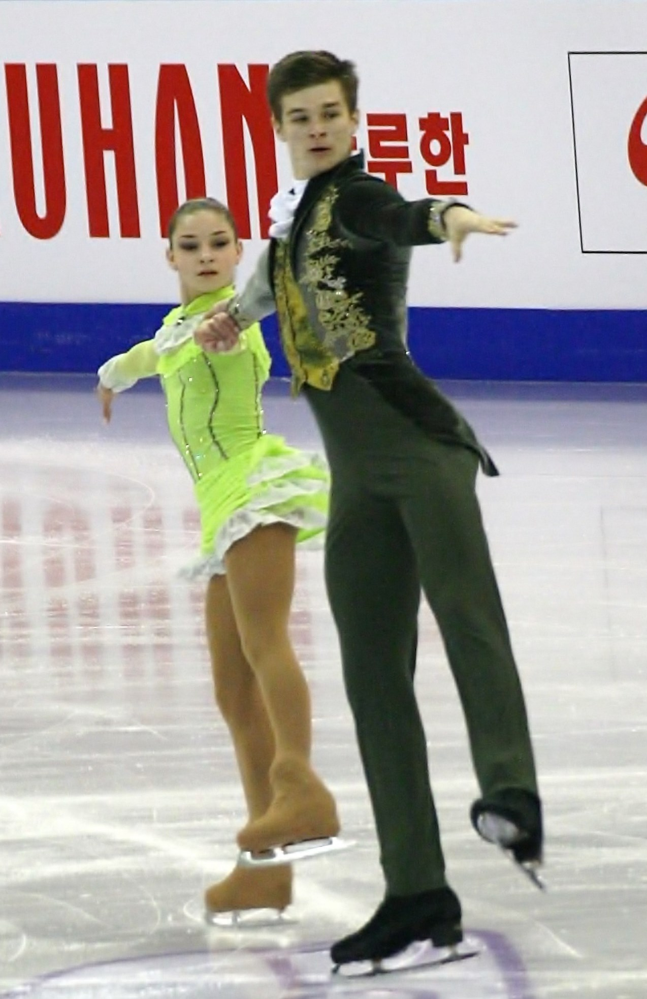 Рената Оганесян и Марк Бардей (Украина) на финале Гран-при по фигурному катанию среди юниоров 2015-2016.